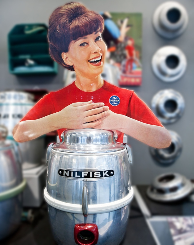 L'aspirateur Nilfisk certainement le plus célèbre de l'histoire, le G70, lancé en 1958.​